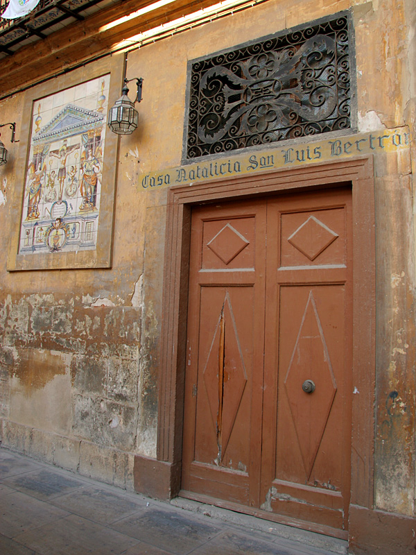 Casa natal de San Luis Beltrán en Valencia, España.